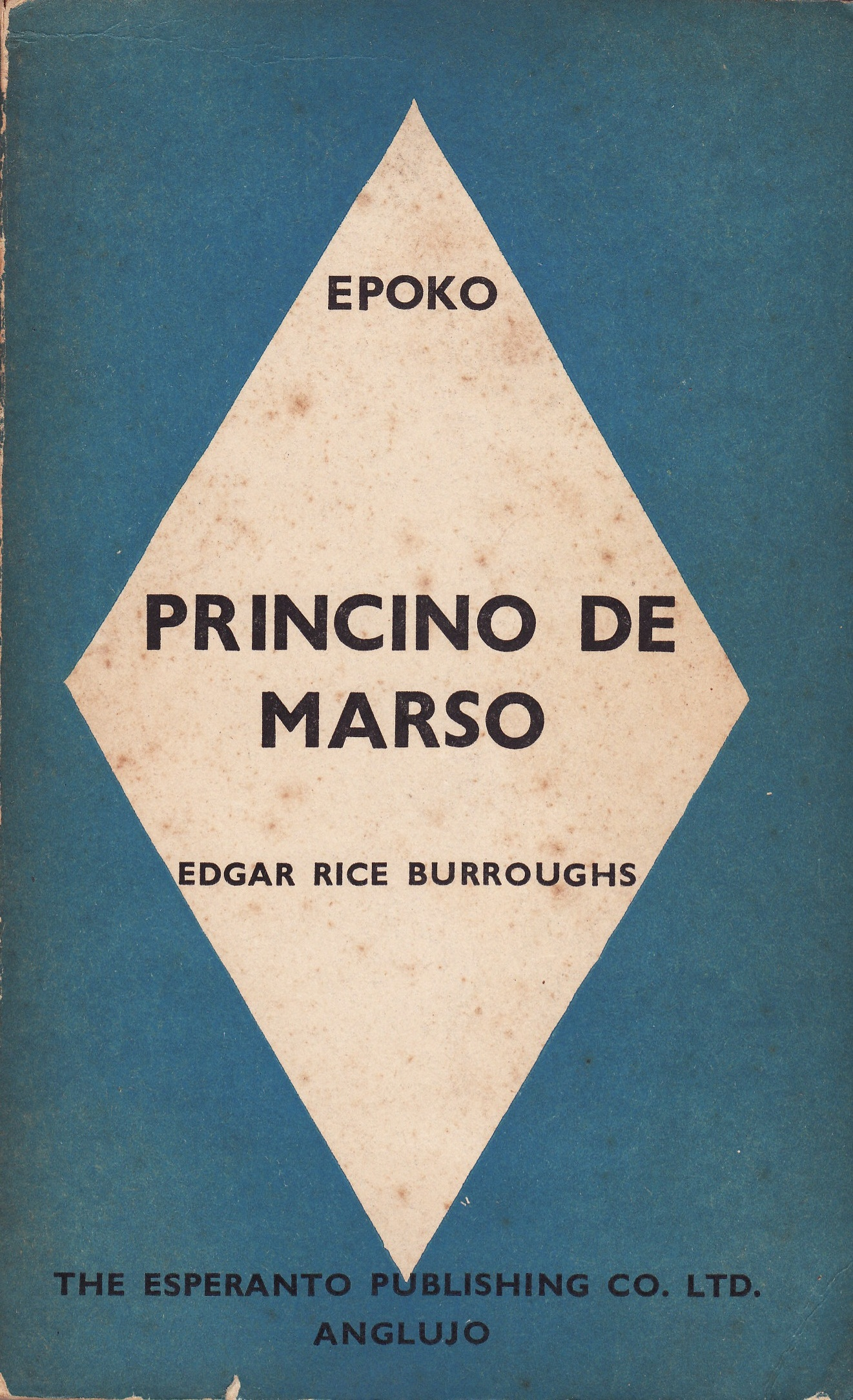 librokovrilo de "Princino de Marso", 1936